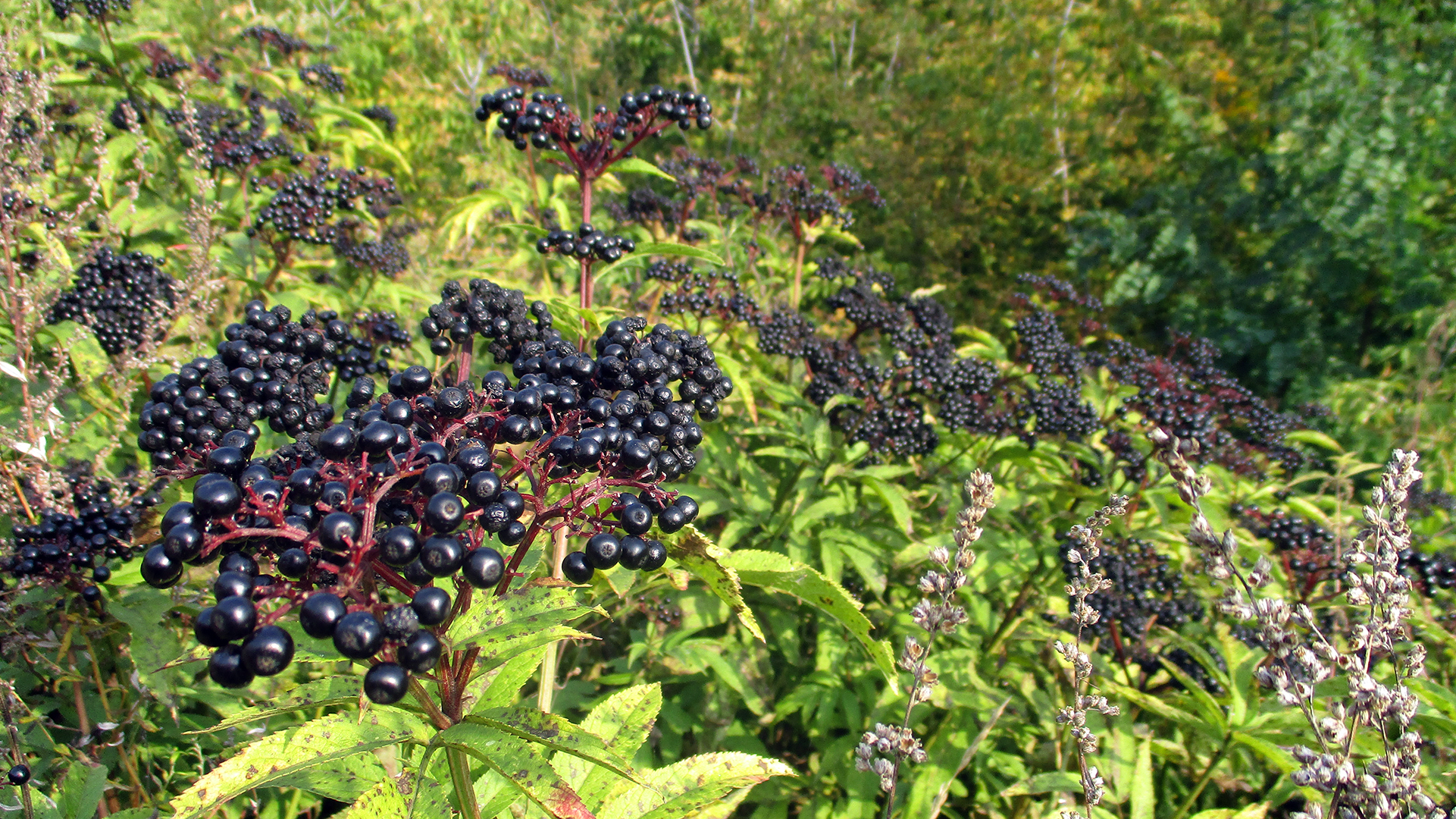 Зарості бузини чорної поблизу Луцька (Волинь, Україна)